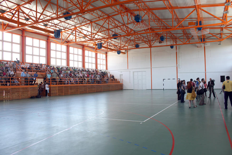 Спортска дворана у Платичеву, Србија.